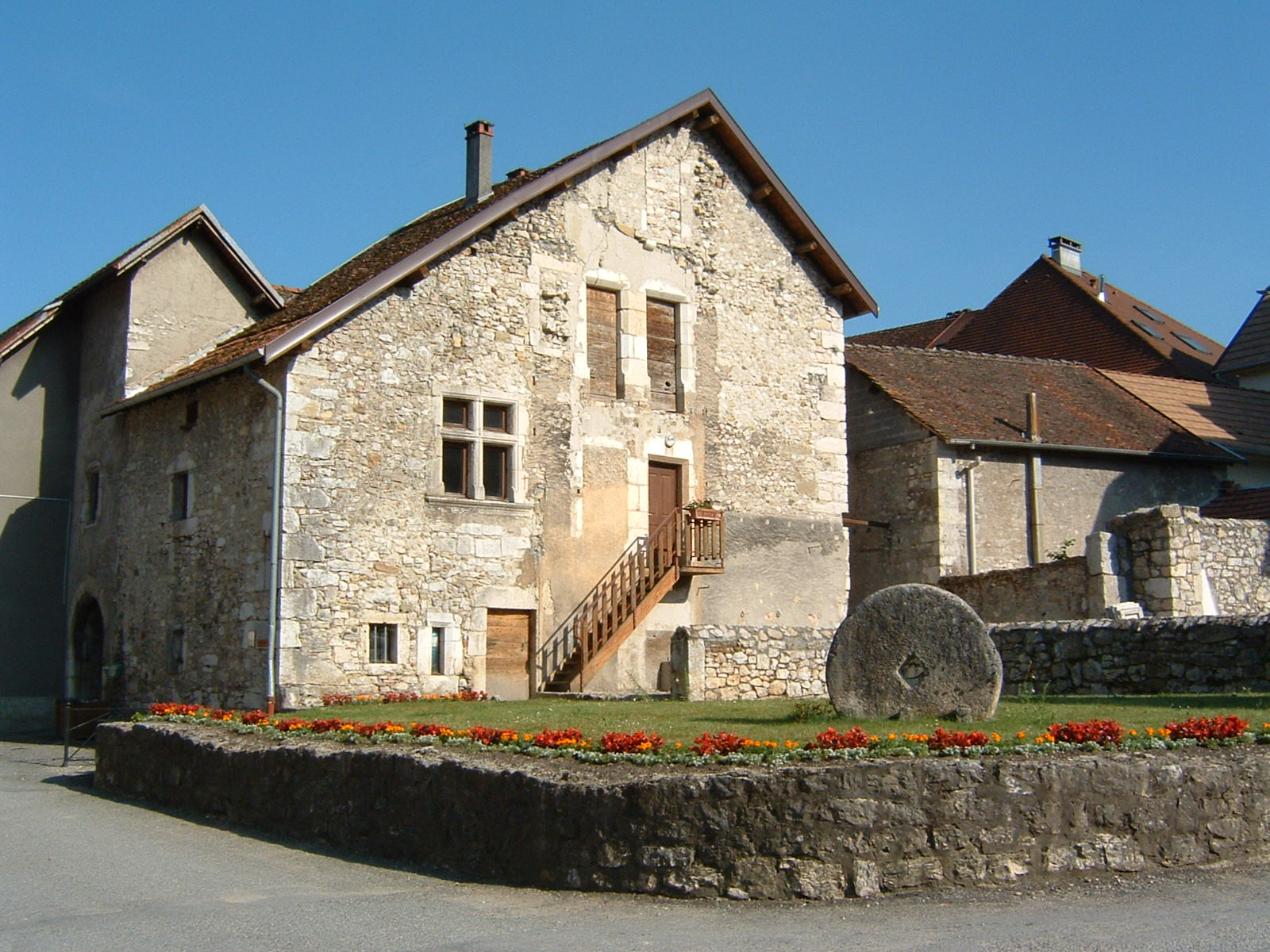 Prieuré de Yenne.